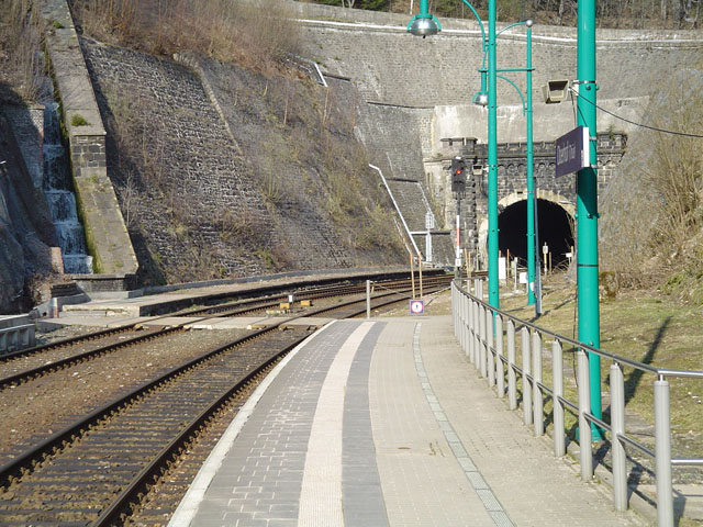 Brandleitetunnel